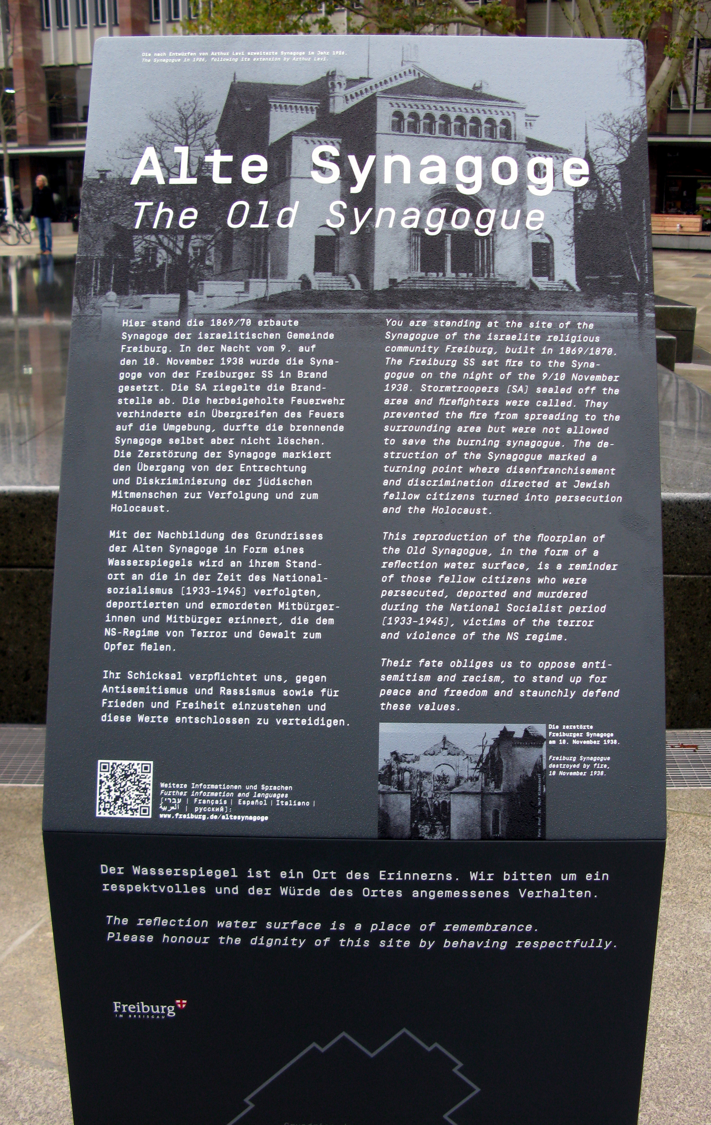 Infostele am Synagogenbrunnen auf dem Freiburger Platz der Alten Synagoge